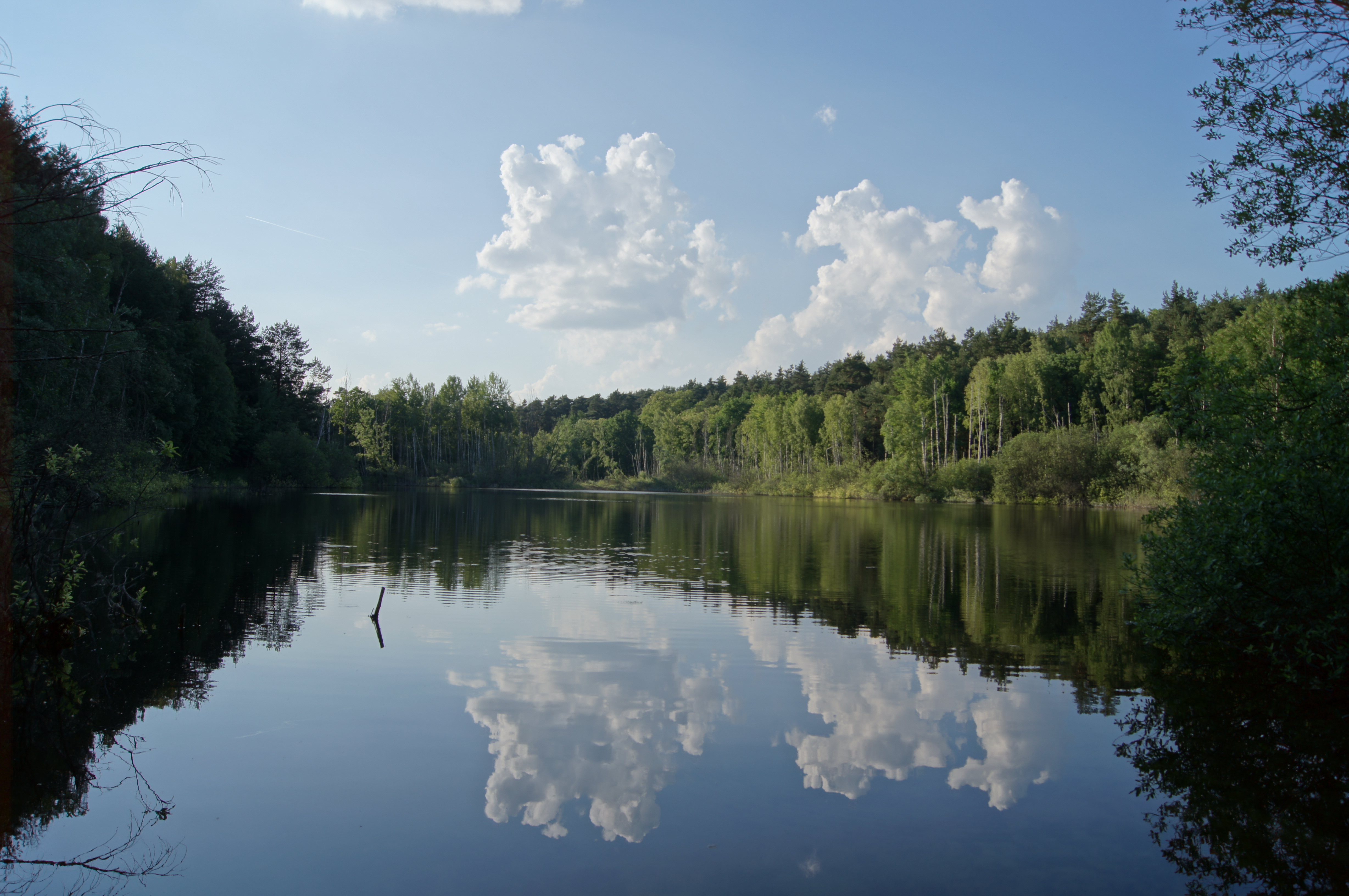 Krumme Hölle der Biegener Hellen in Hohenwalde (Frankfurt (Oder))